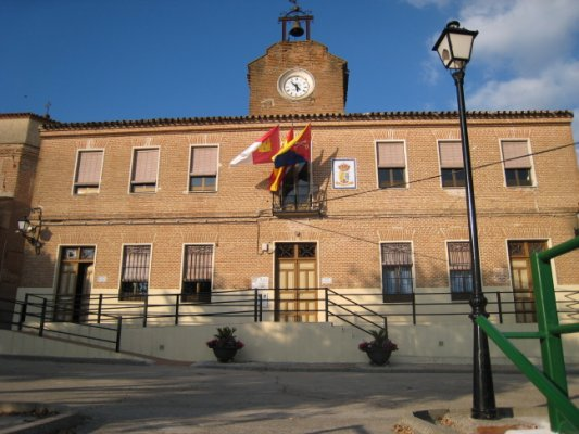 Fachada principal del ayuntamiento